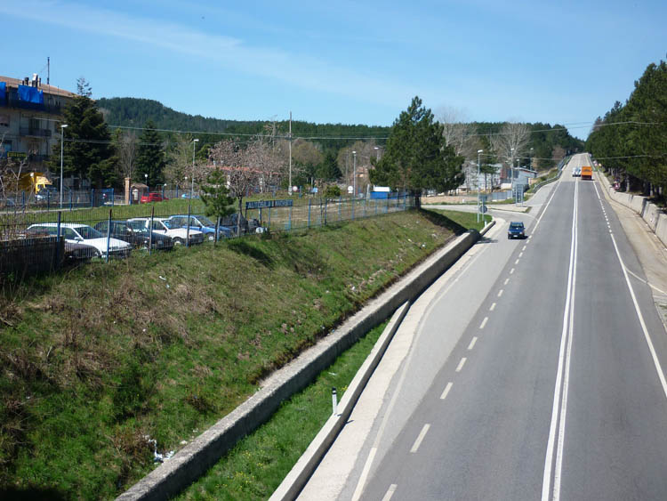 SS 107 - presso San Giovanni in Fiore